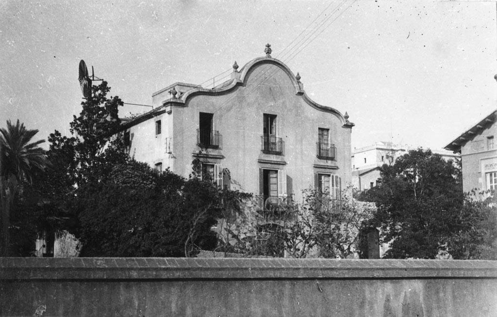 Façana de Can Tusquets. Jordi Audet i Viñals (1926-11)